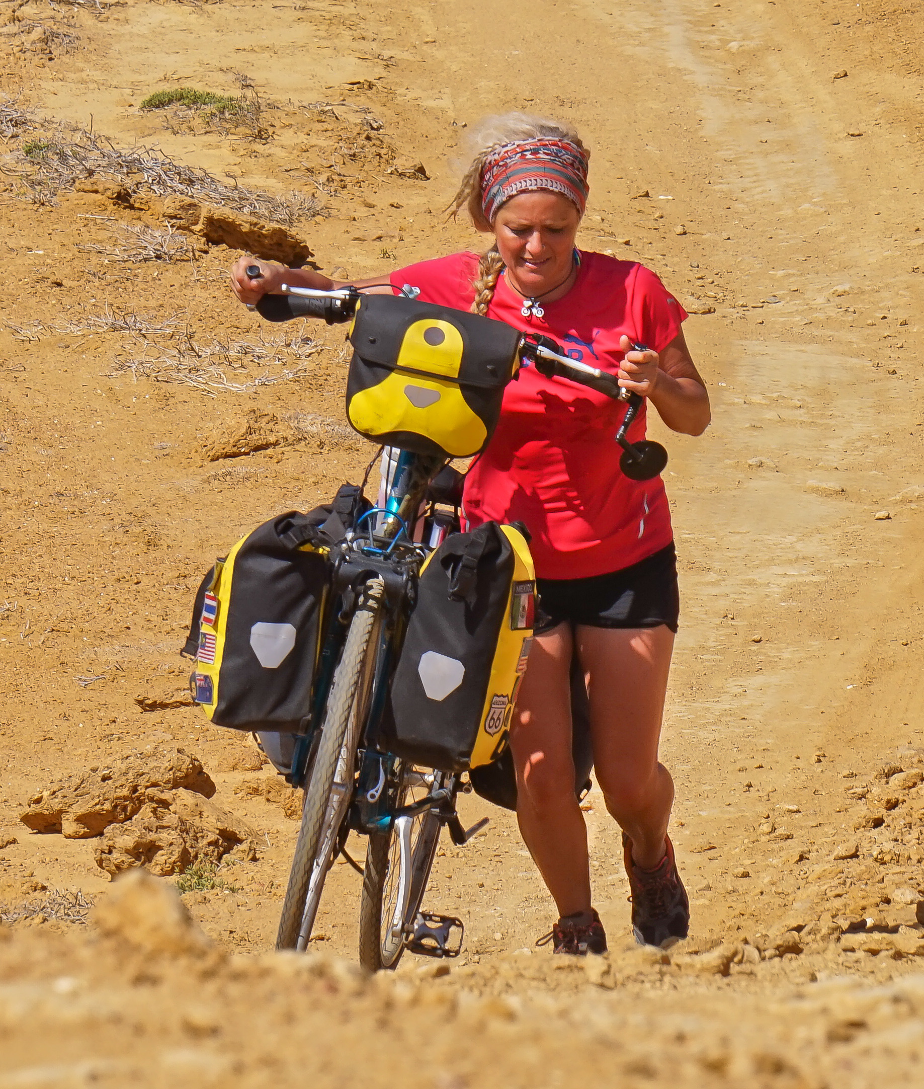 Desierto La Guajira. Colombia. Cristina Spinola. Sola En Bici. Pedaleando hacia la Punta Gallinas, el extremo más septentrional de la placa continental de América del Sur.